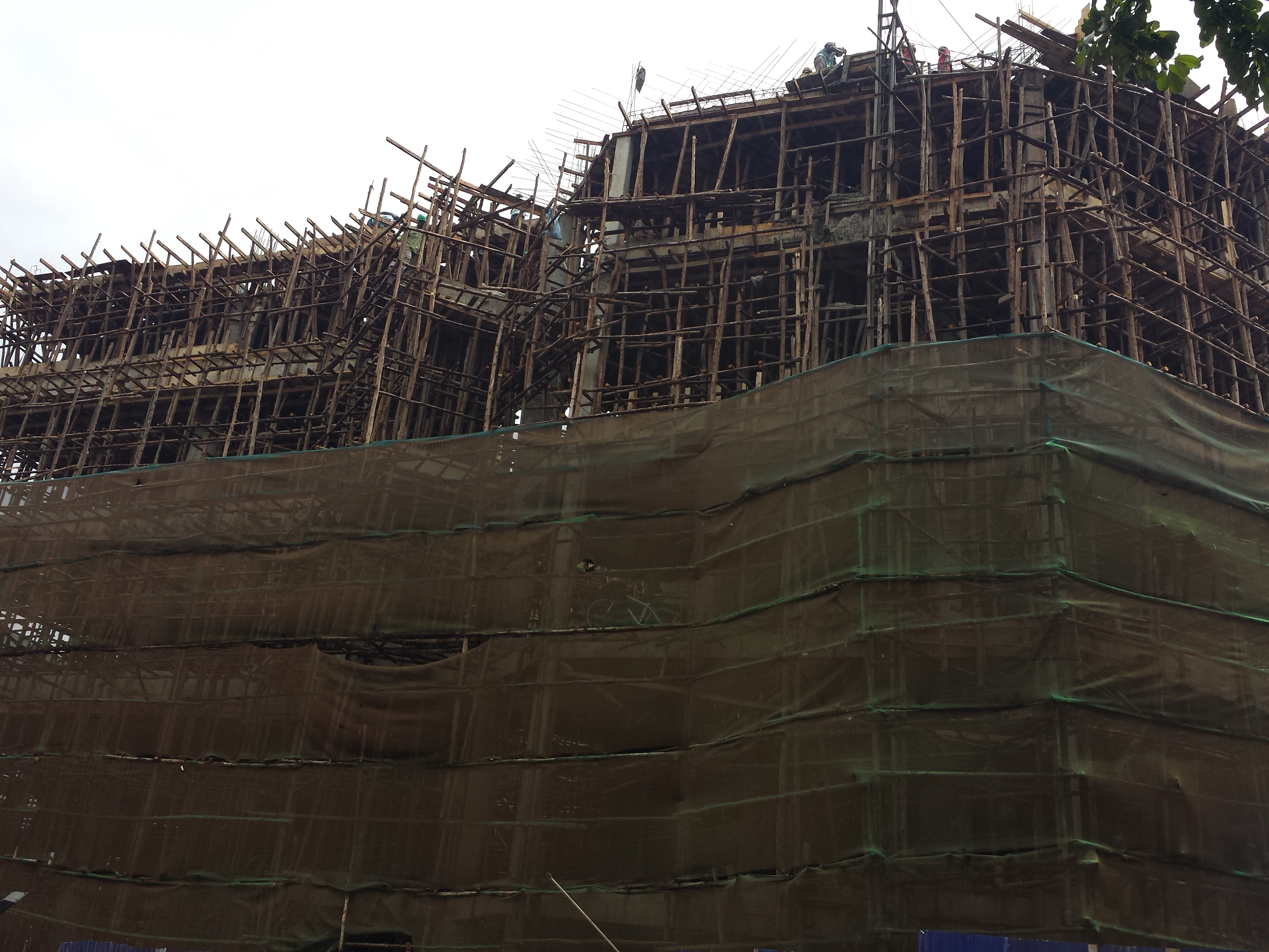 בנייה מקומית בקמפלה- עיר הבירה